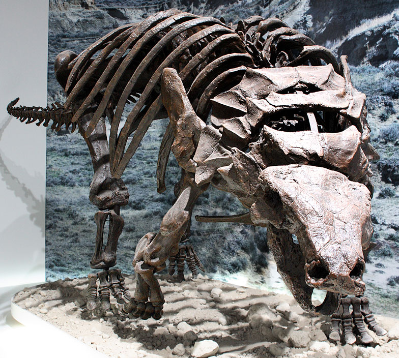 Edmontonia - 01